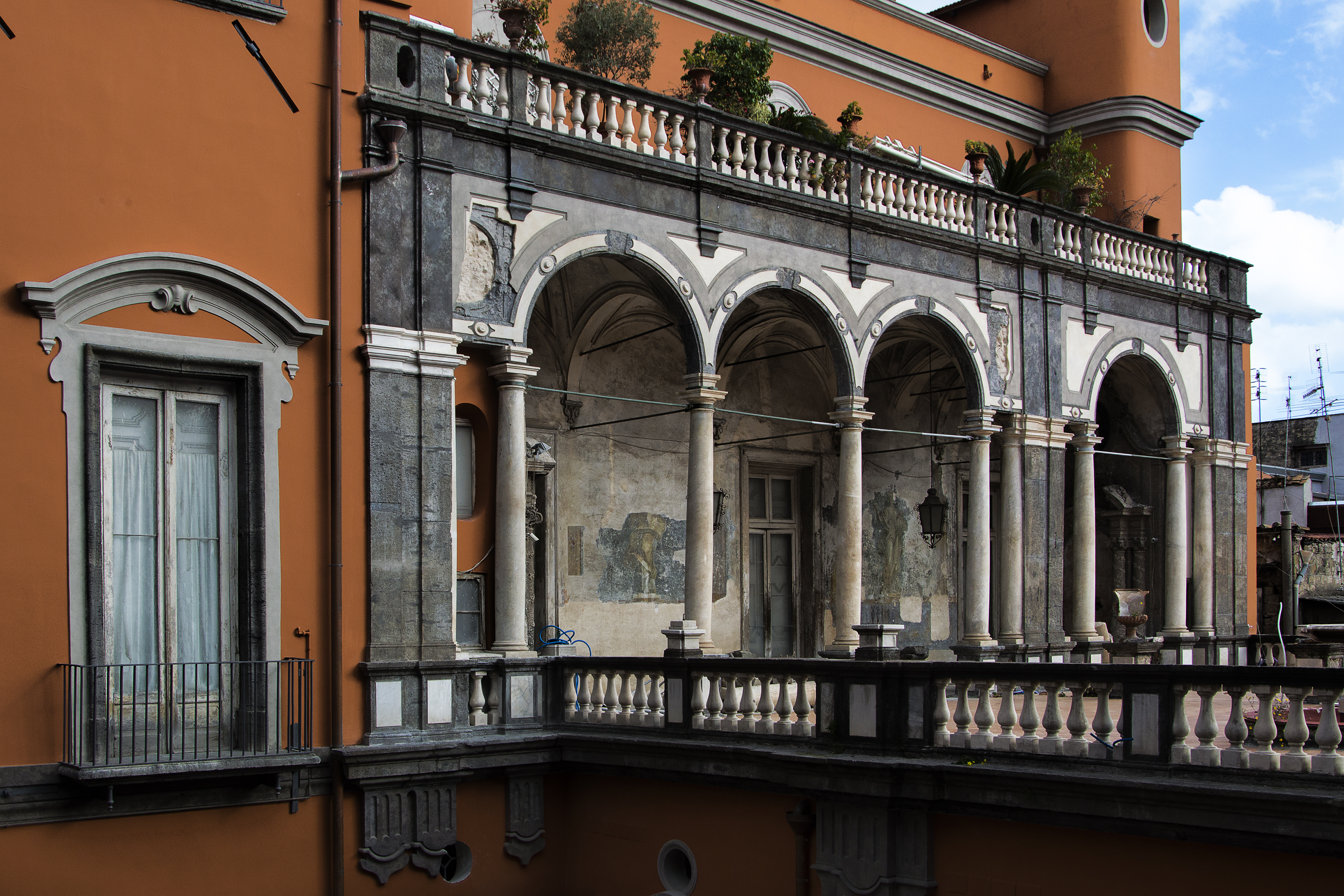 Loggiato di Cosimo Fanzago